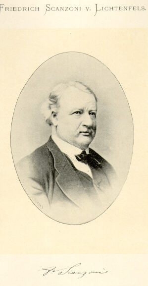 Friedrich Wilhelm von Scanzoni also Friedrich Wilhelm Scanzoni von Lichtenfels (1821 - 1891); German physican and gynecologist